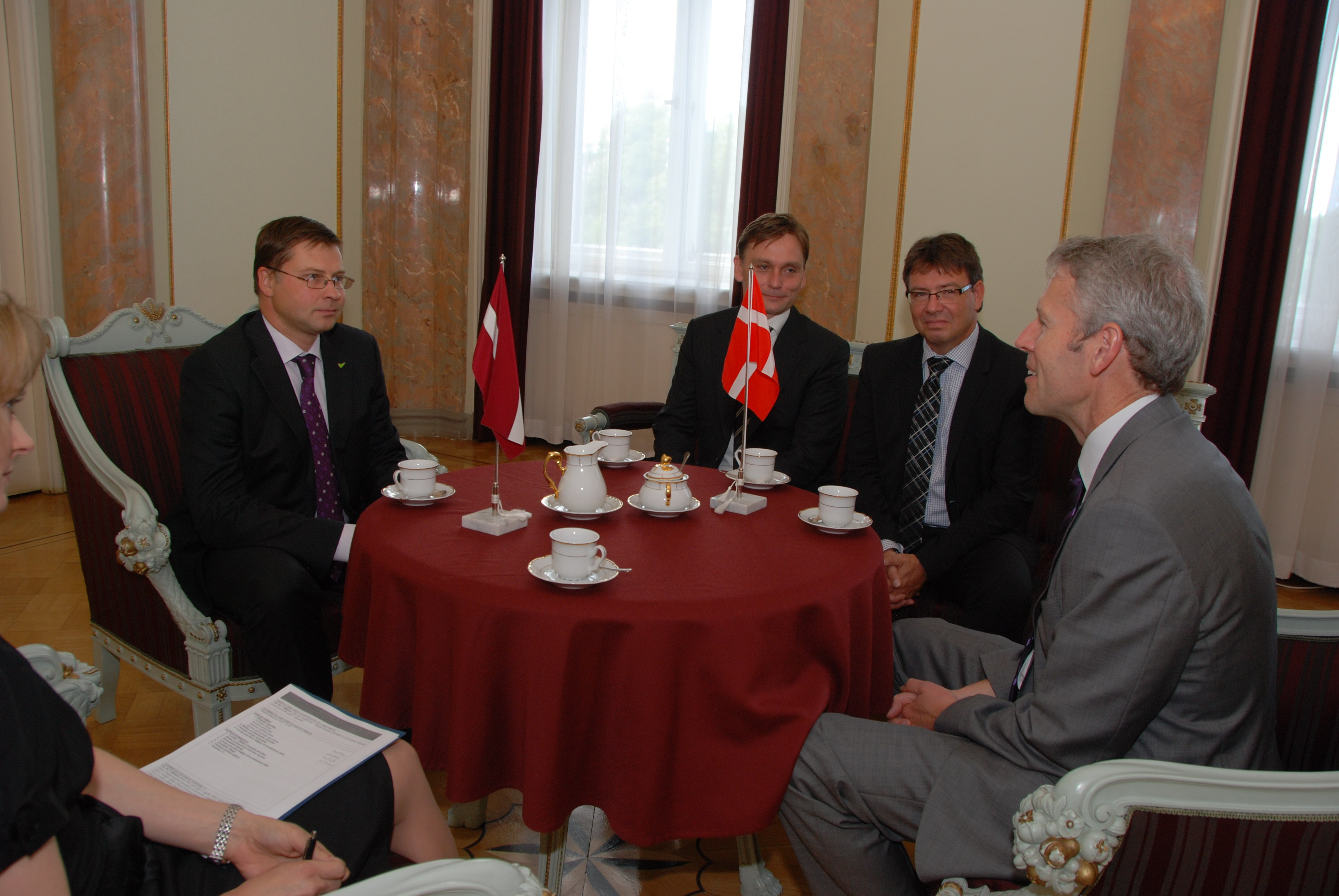 Ministru prezidents Valdis Dombrovskis pieņem Dānijas Karalistes vēstnieku Latvijā Ufi Oto Volfhekelu (Uffe Otto Wolffhechel), kurš ieradiess atvadu vizītē Foto: Aivis Freidenfelds, Valsts kanceleja